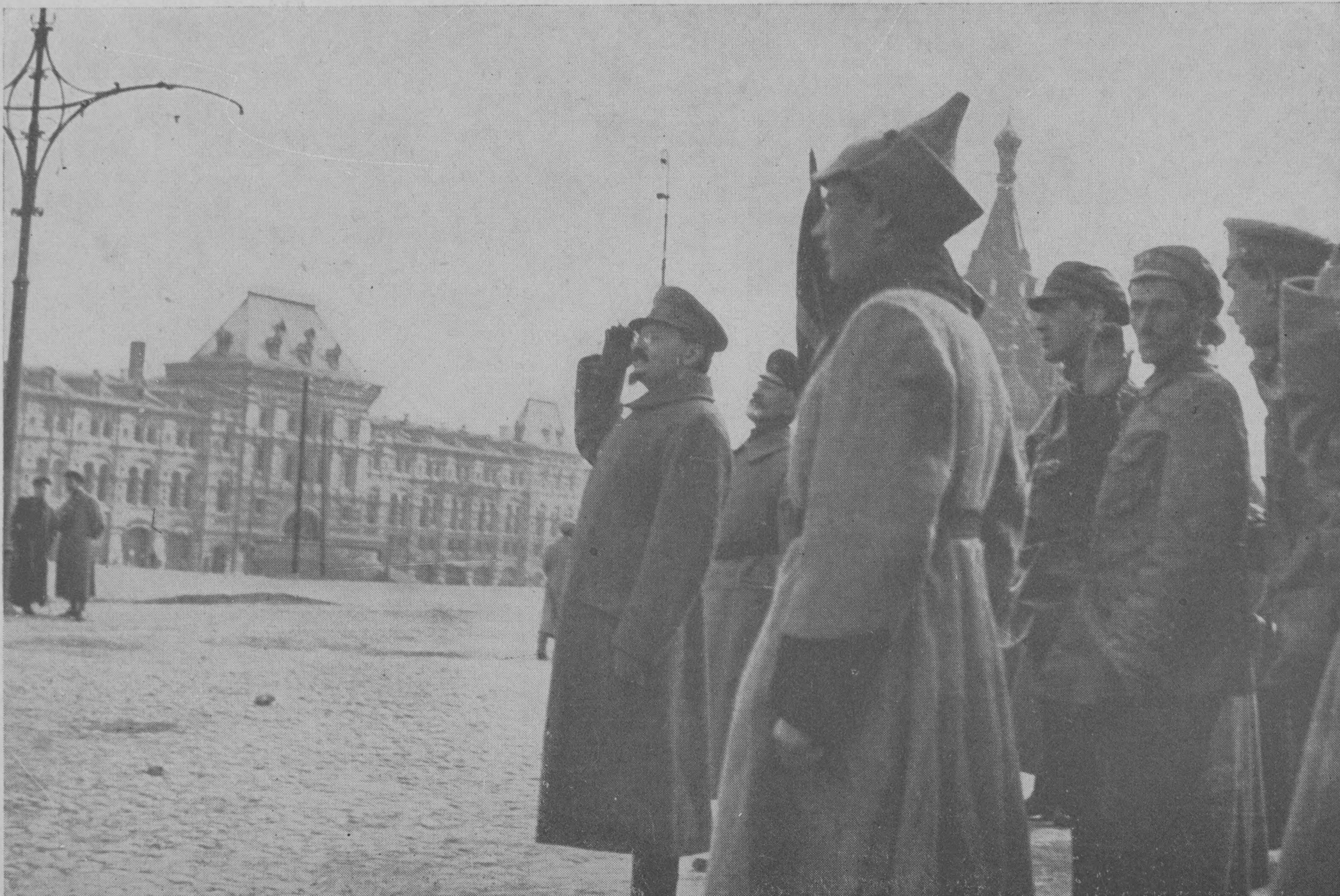 Trotsky pasando revista a tropas del Ejército Rojo.